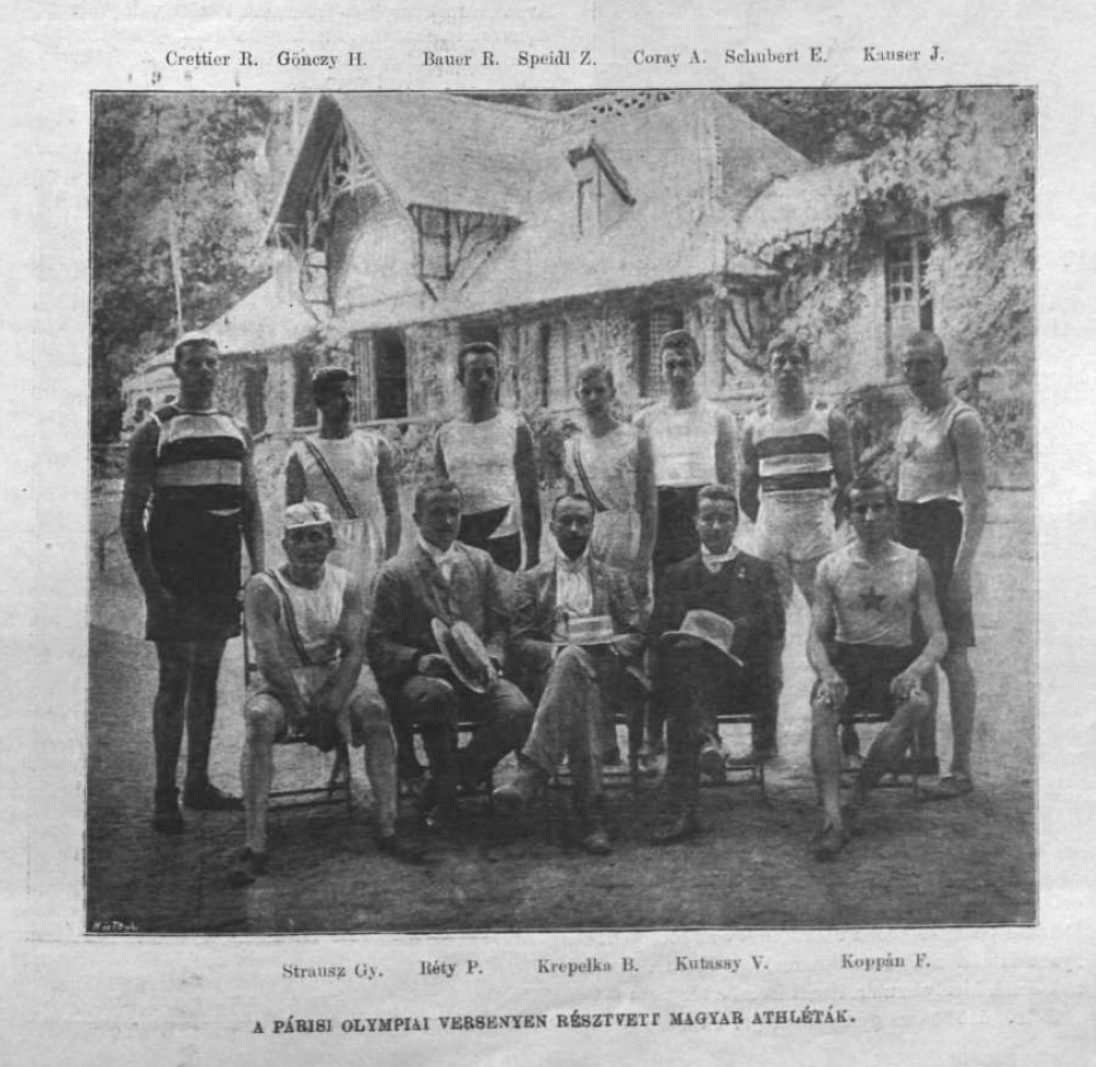 A magyar atléták a párizsi olimpián